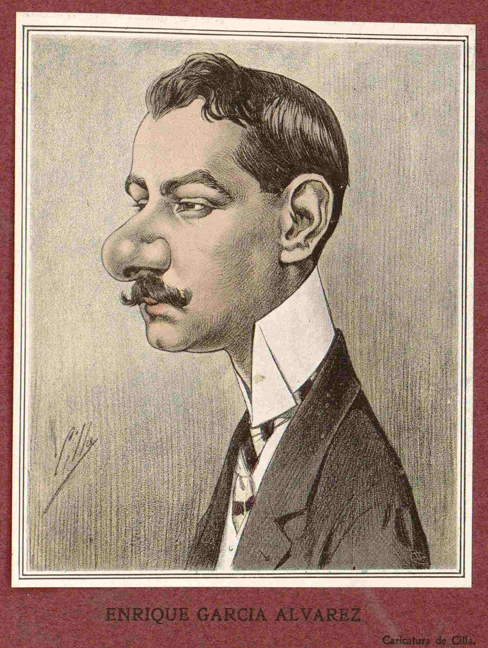 Enrique García Álvarez. caricatura de Cilla.